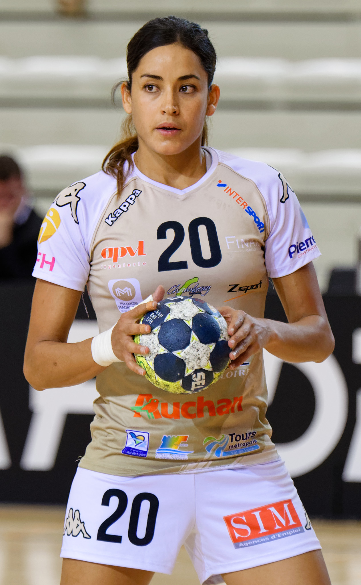 Rencontre Issy Paris Hand / Chambray. A Issy Les Moulineaux, le 15 septembre 2017.